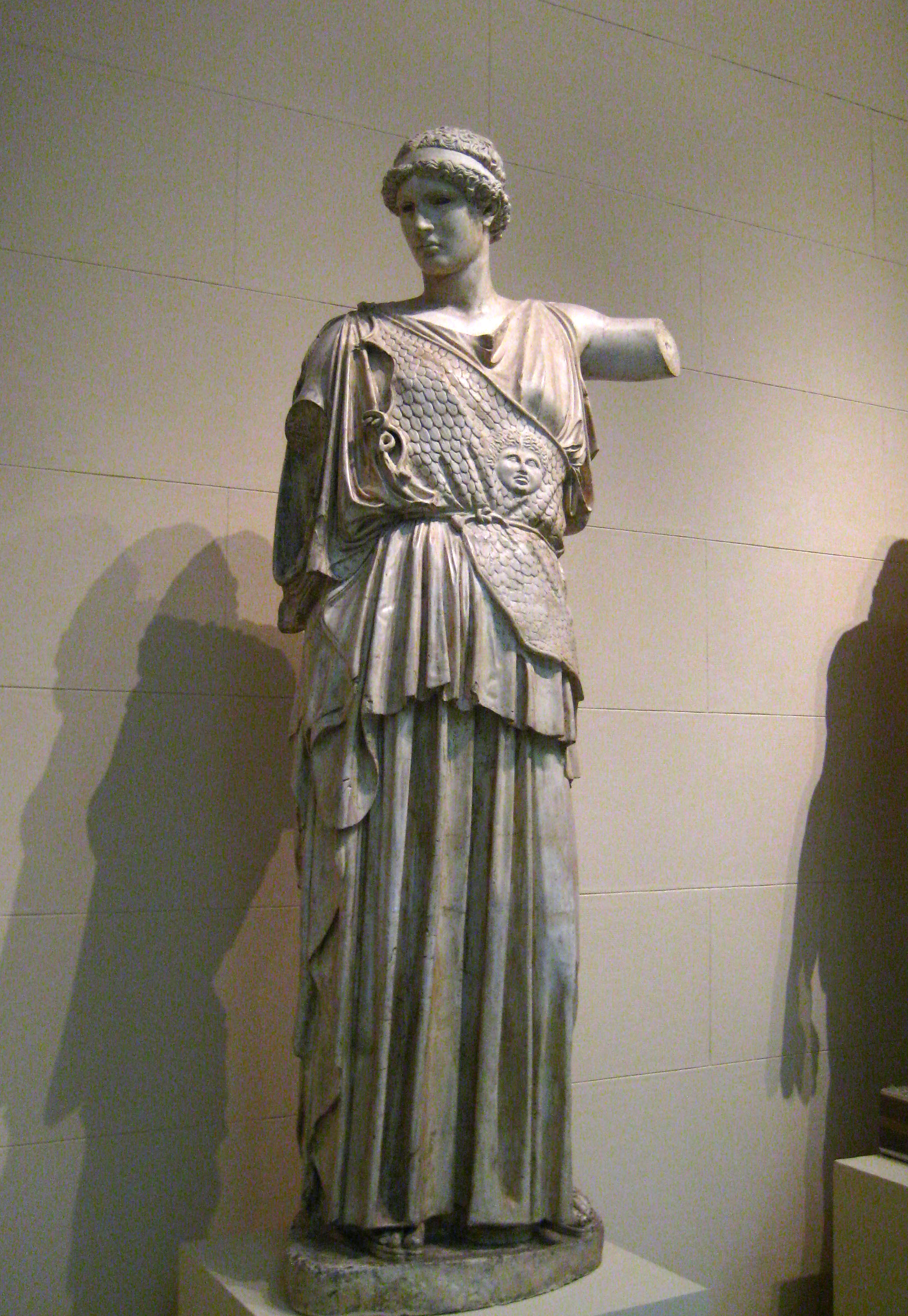 Phidias. Athena Lemnia in in the Staatliche Museum, Albertinum, Dresden. Plaster cast in Pushkin Museum, Moscow